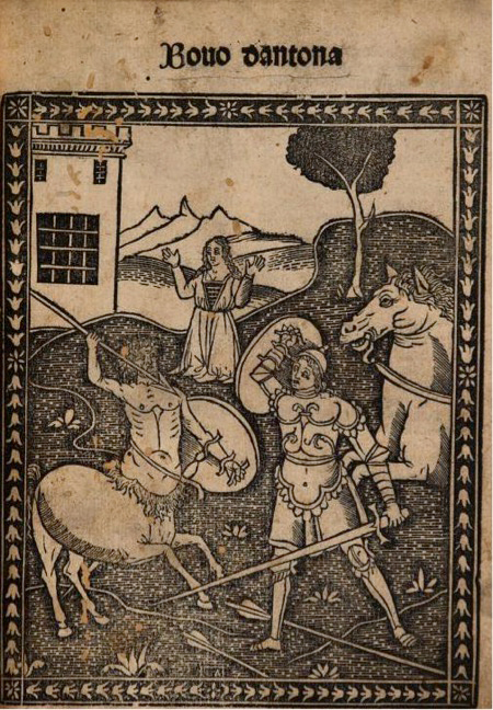 Bovo d’Antona, Venezia, Pietro Quarengi Bergamasco, 1514